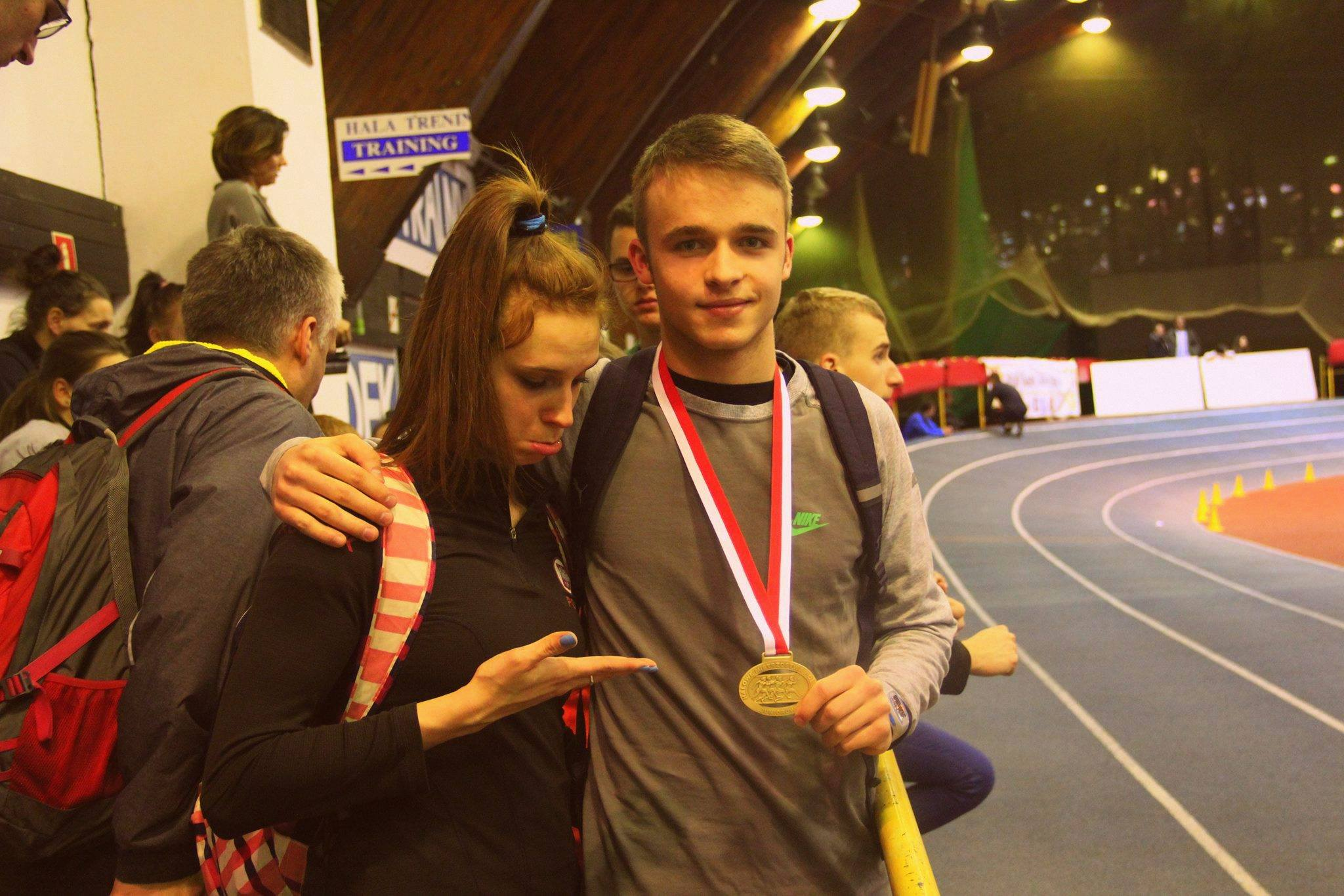 Eryk Hampel razem z Kamilą Cibą na Halowych Mistrzostwach Polski 2014